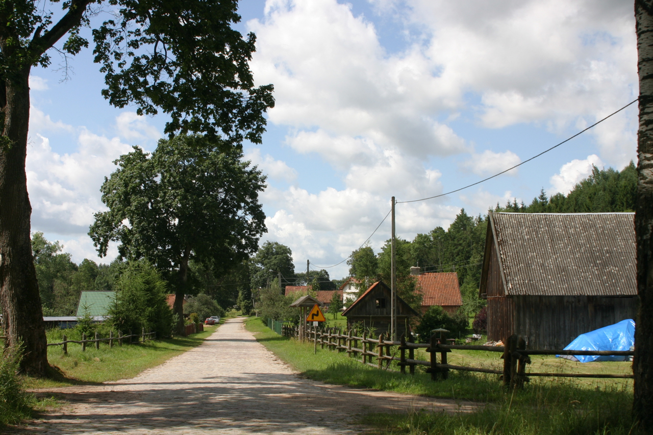 Kwiedzina